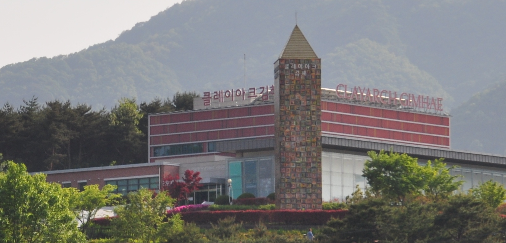 김해 진례면 소재, 클레이아크김해미술관 외관